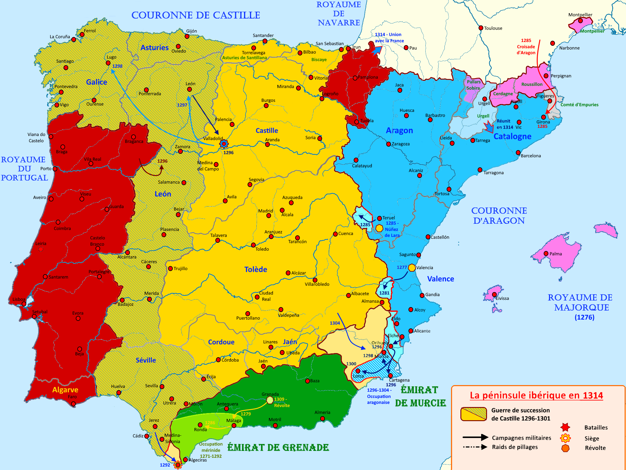 Carte de la péninsule ibérique en 1314 illustrant les grands évènements de la période